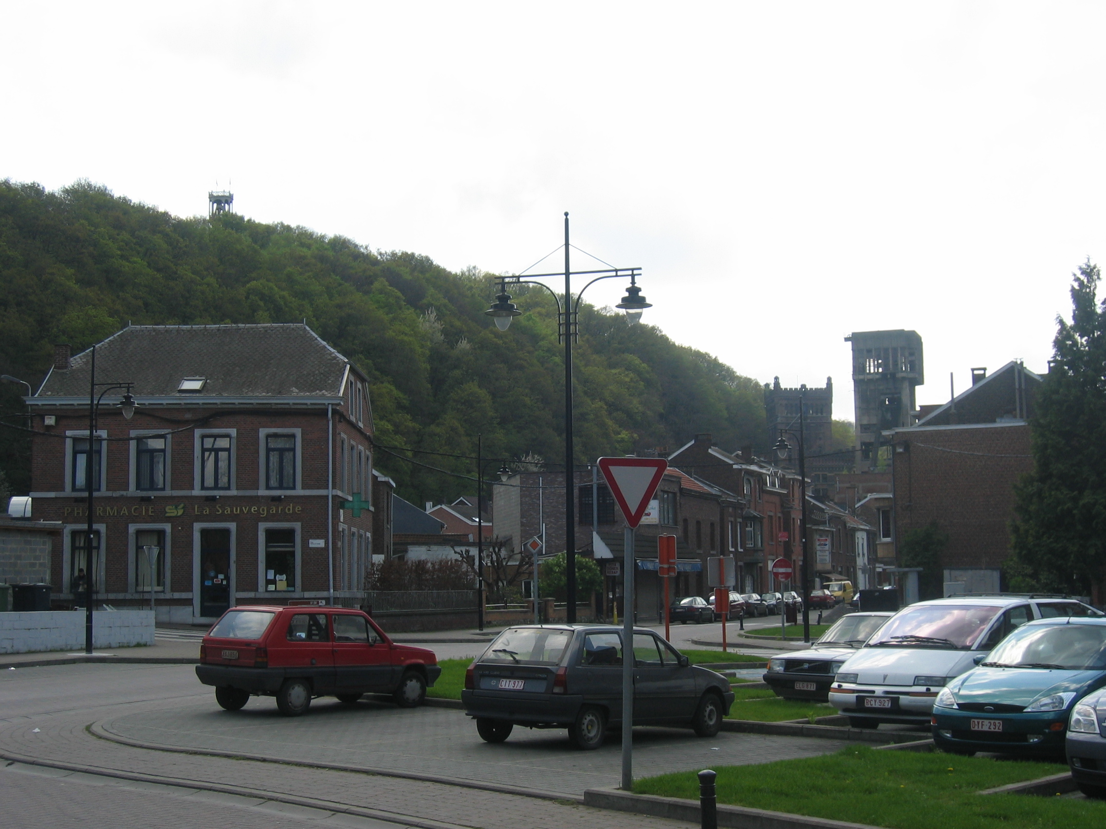 Ville de Cheratte